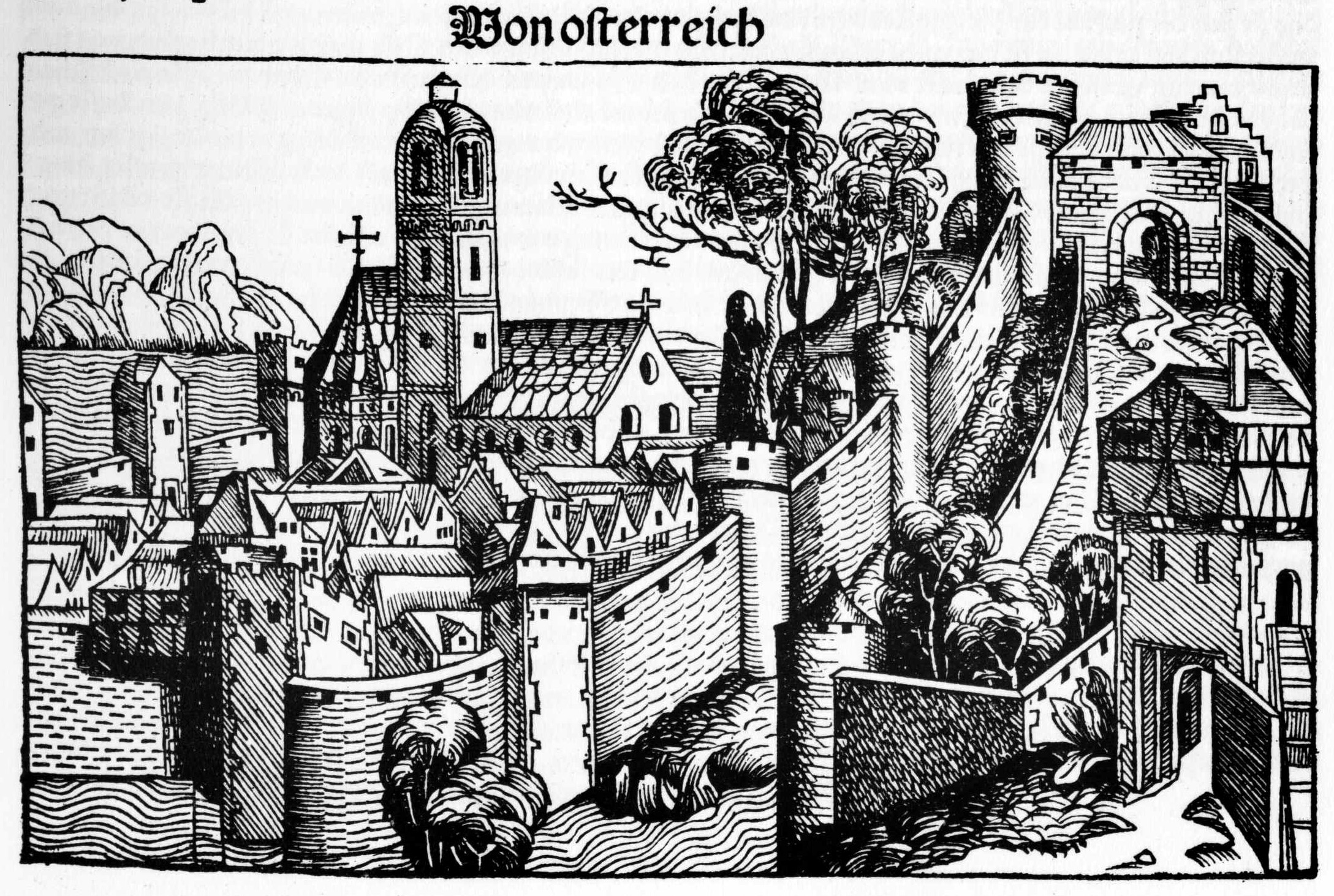 Stadtansicht aus der Schedelschen Weltchronik (Bl. CCLXXVI). Sie zeigt vermutlich die Stadt Steyr um oder nach 1450[1]